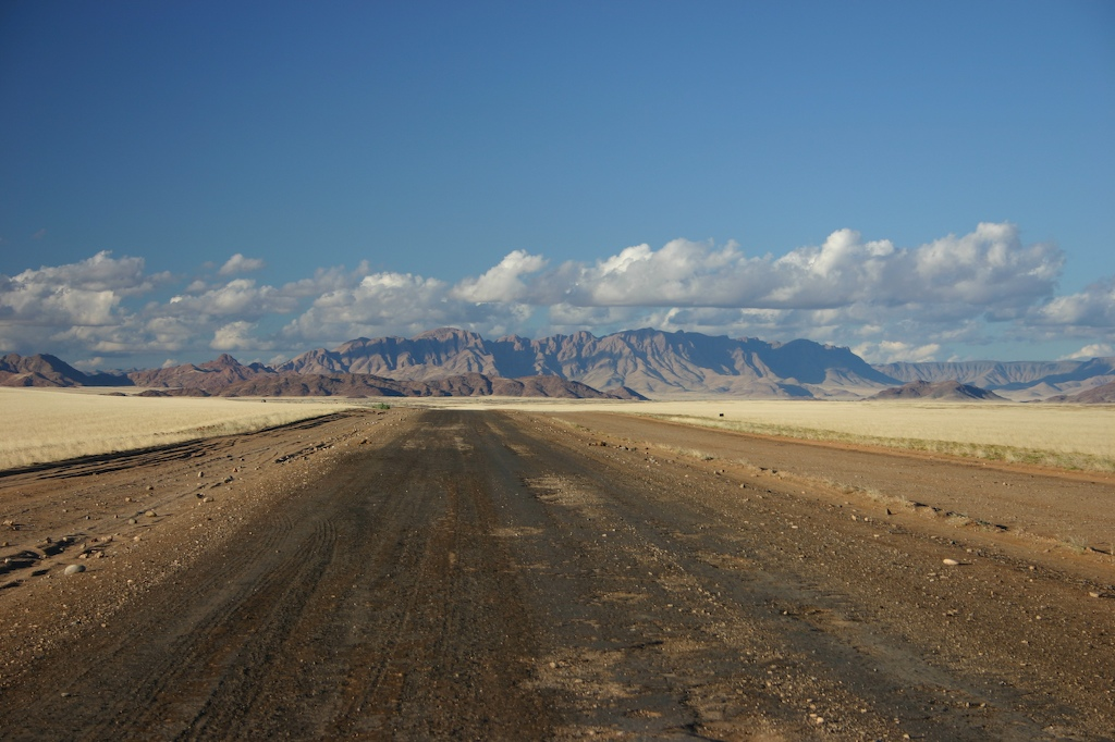 Naukluft, seen from Sesriem